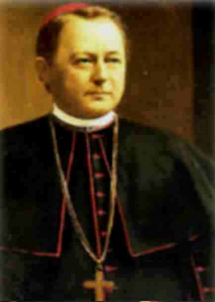 Mikuláš (Nicholas/Nicolas) Tóth, 1833-1882, Griechisch-katholischer Bischof der Eparchie Presov (1876-1882)